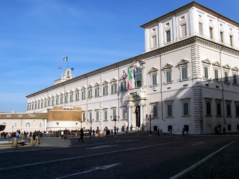 Roma - Palazzo del Quirinale